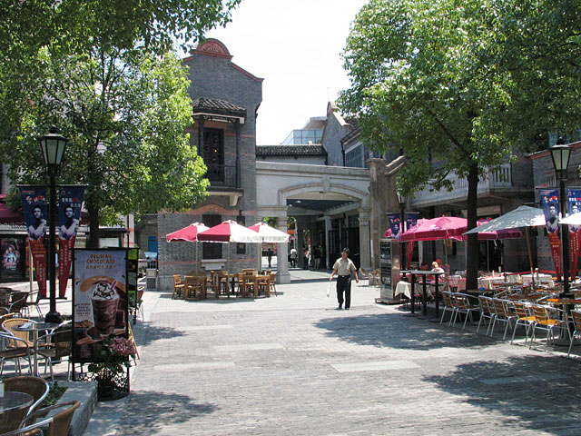 Shanghai Xintandi